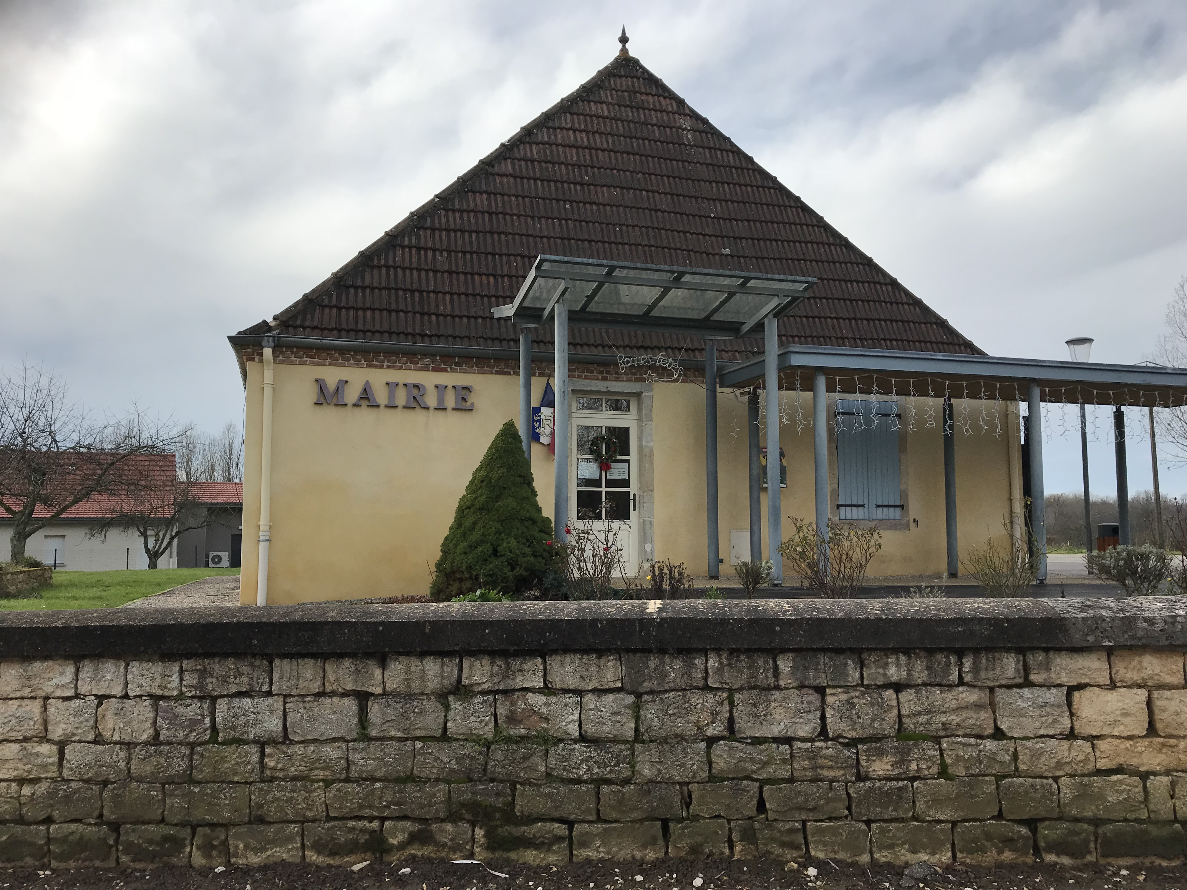 Image de Pleure (Jura, France) en janvier 2018.